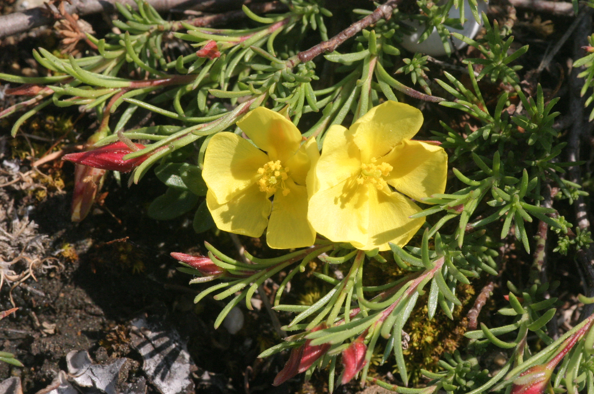 Gewöhnliche Nadelröschen (Fumana procumbens) Aufnahmeort: Ruster Höhenzug, Burgenland, Austria